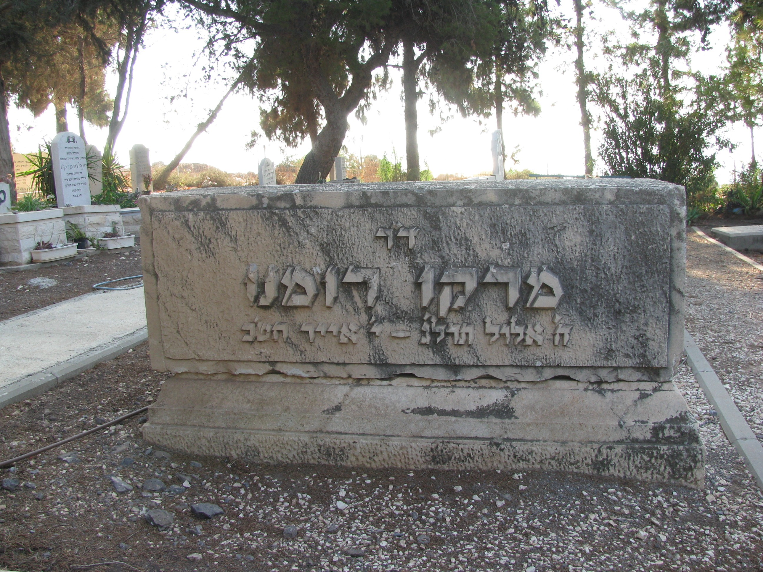 מצבת קברו של ד"ר מרקו רומנו כפי שצולמה ב-2012 בבית העלמין בכפר חיטים